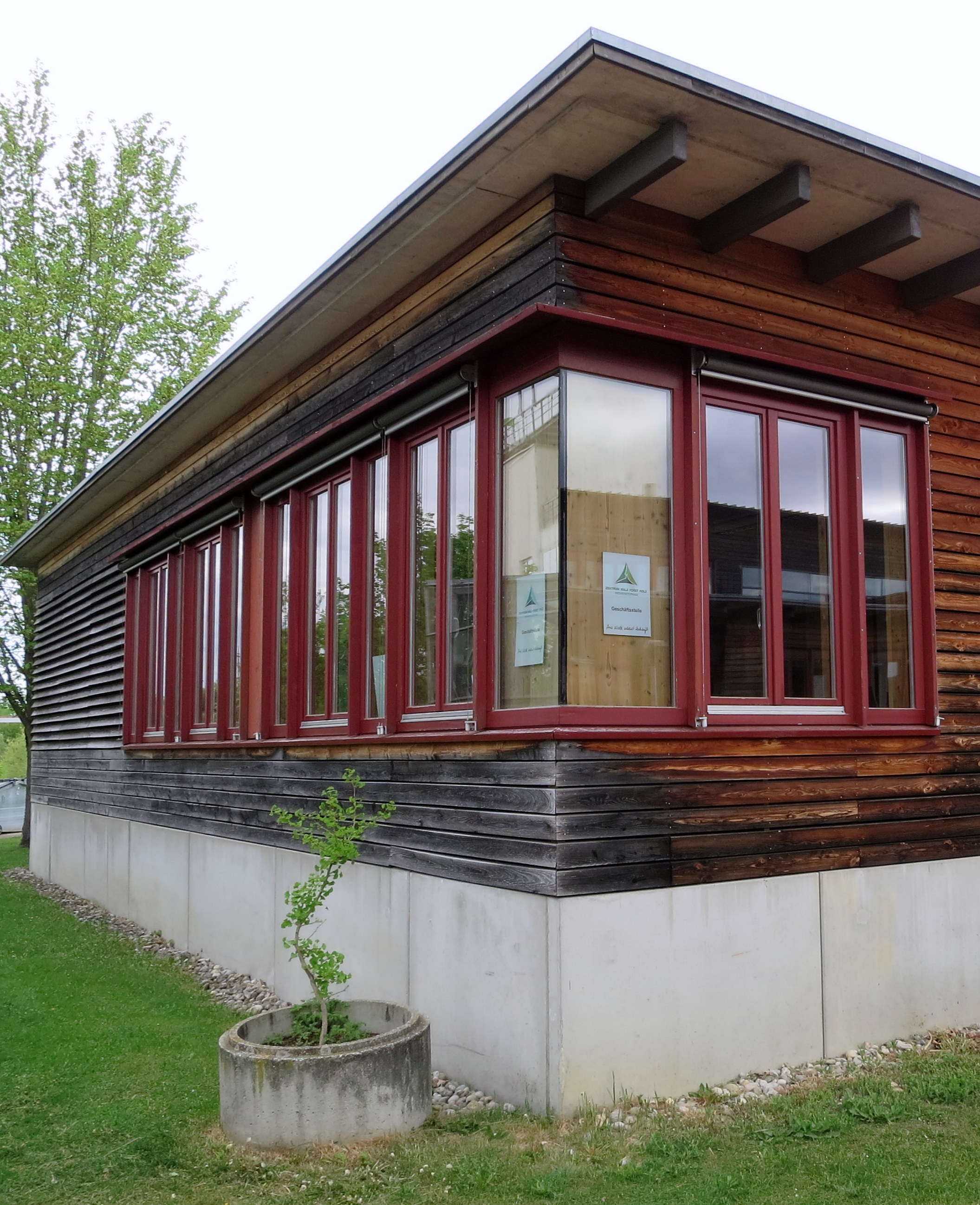 Büro im Gebäude der HSWT